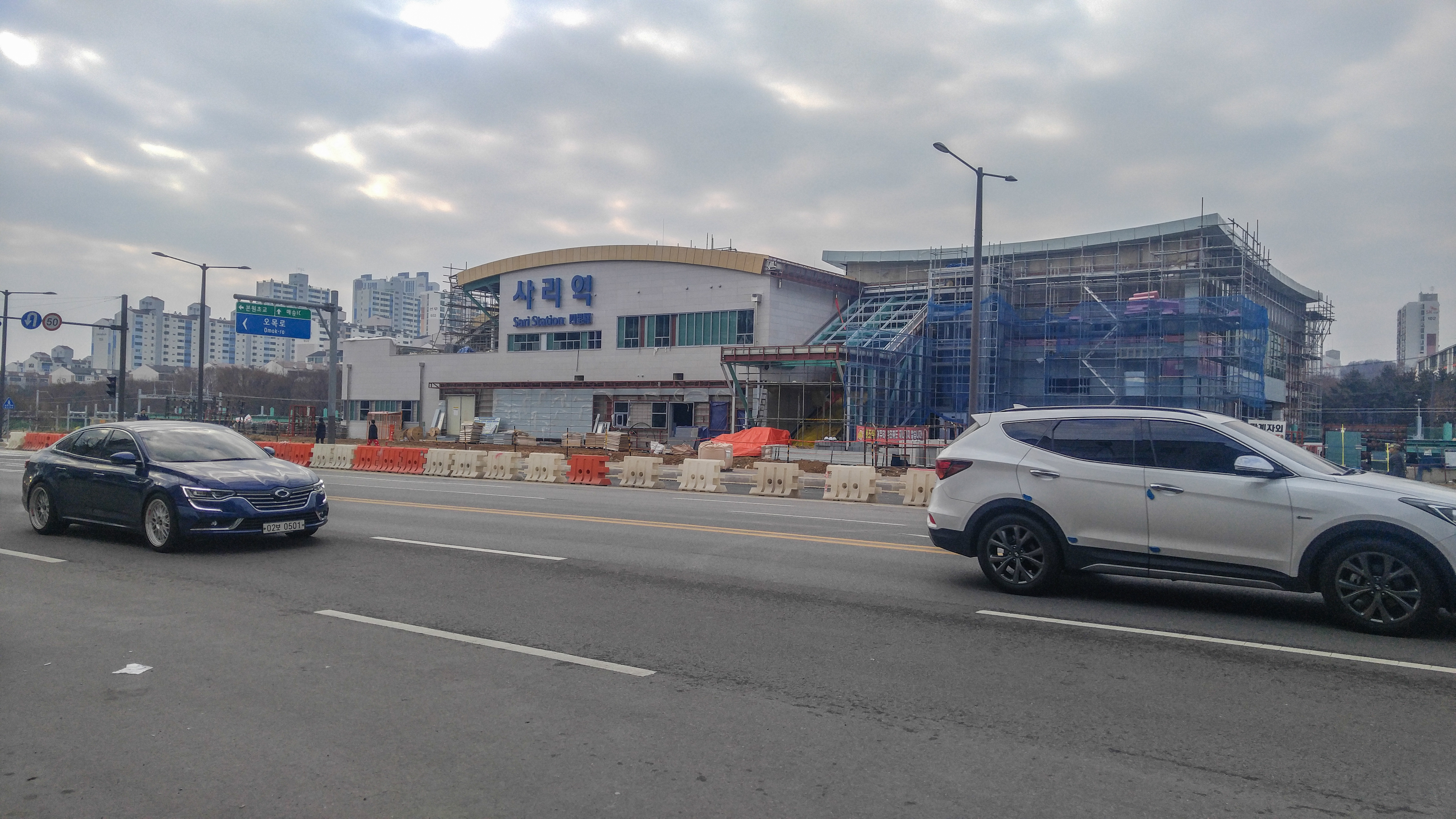 수인선 사리역